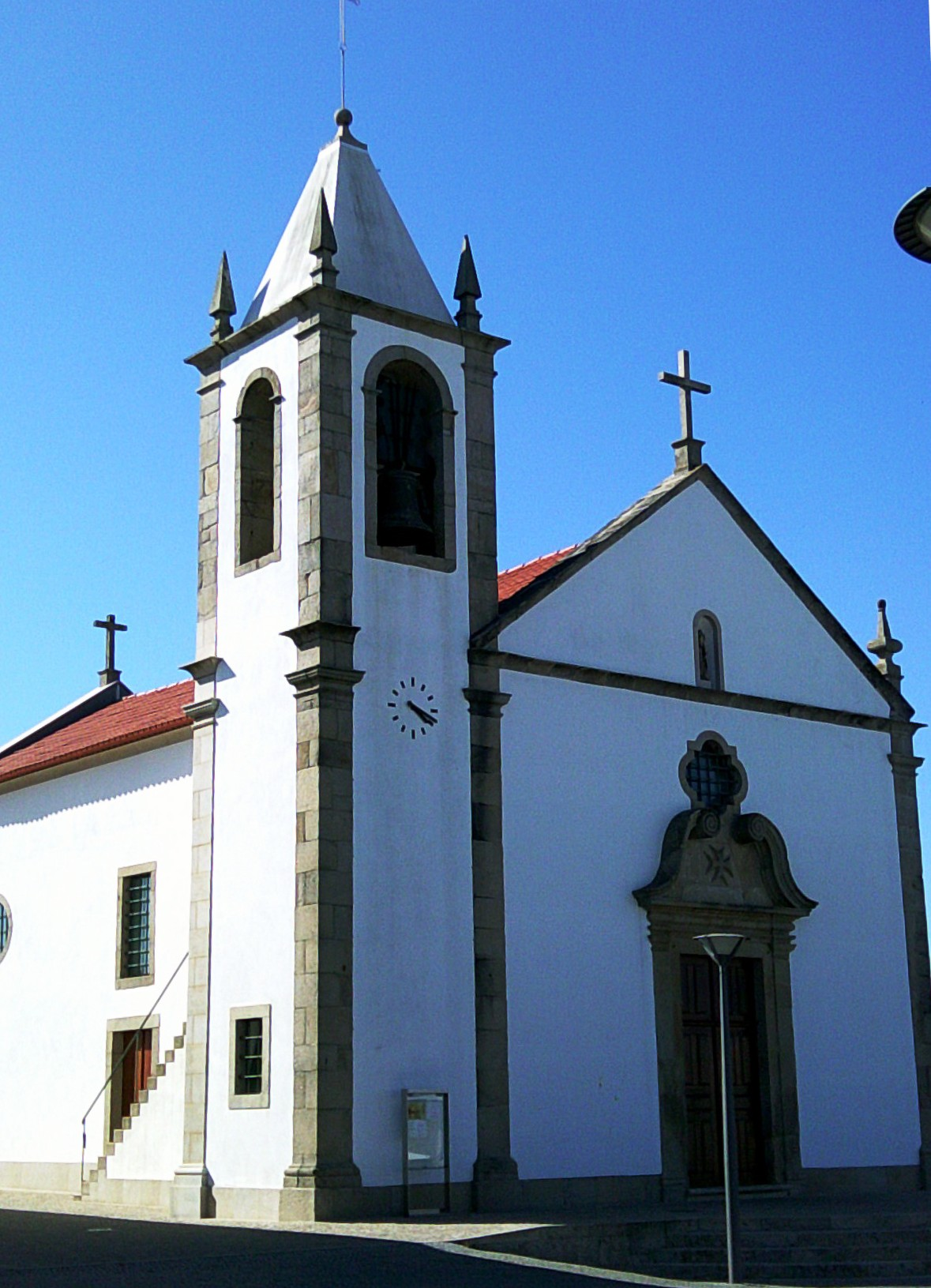 Igreja Paroquial de São Martinho do Bispo, freguesia de Arada, concelho de Ovar, distrito de Aveiro, Portugal.